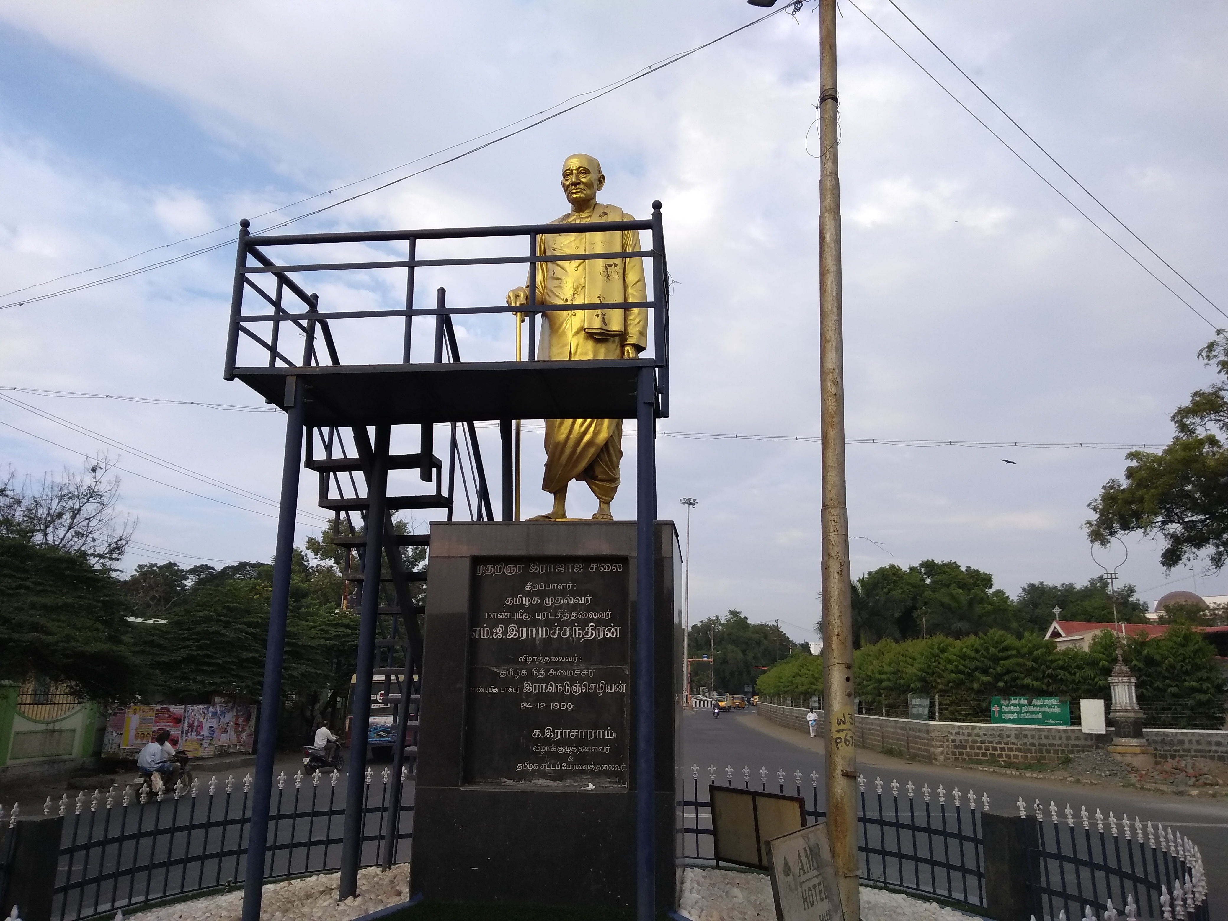 சேலத்திலுள்ள சி இராஜகோபாலாச்சாரியின் சிலை